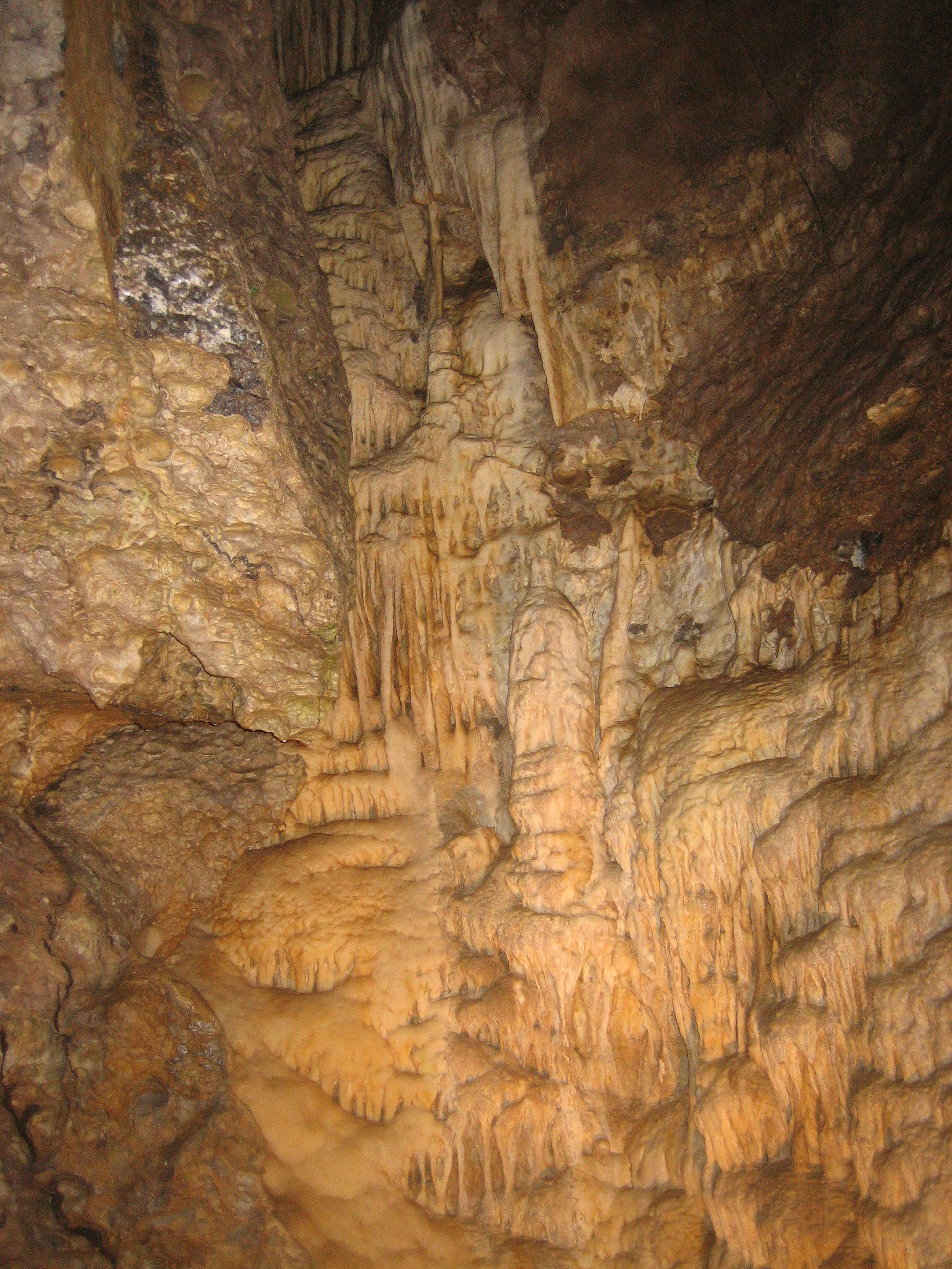 Onze lieve vrouw en manneke pis. Aparte vormen in de grotten van Han.